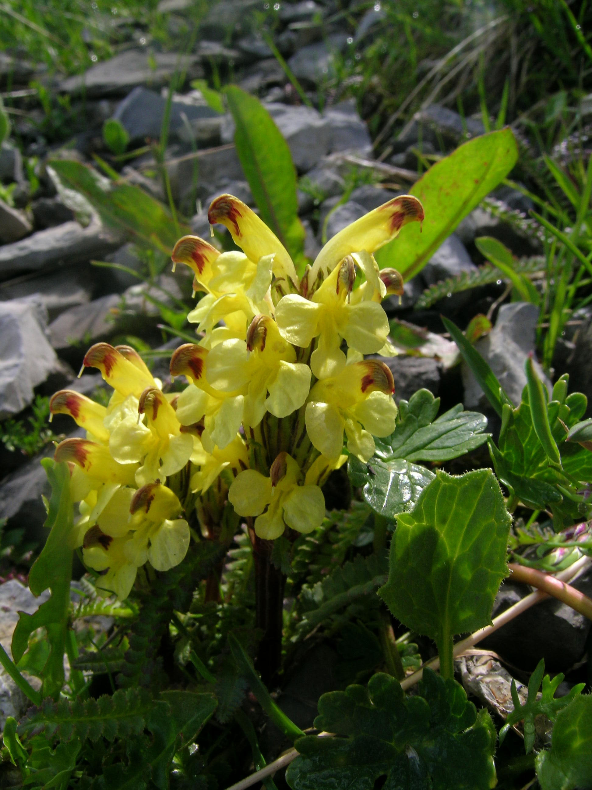 Pedicularis oederi, Schynige Platte, Kanton Bern, Schweiz